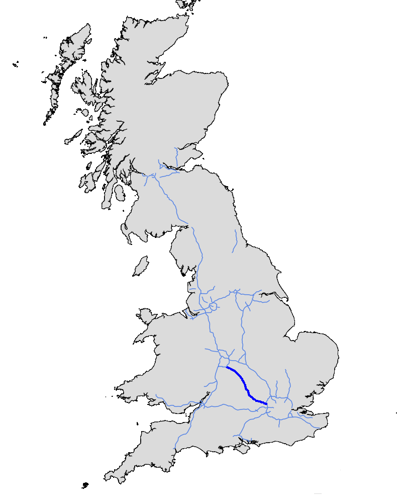 M40